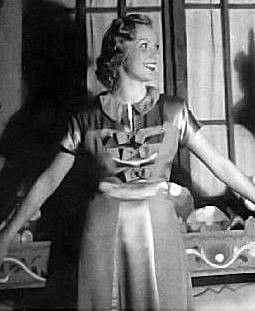 Komlós Juci magyar színésznő Szegeden